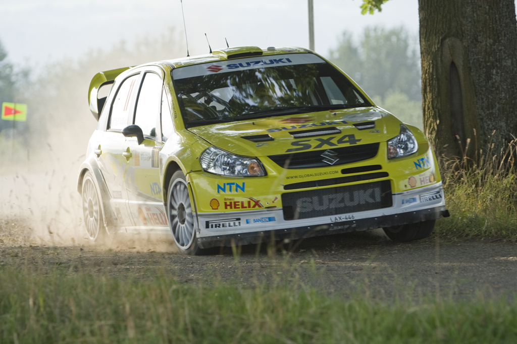 Toni Gardemeister driving his Suzuki SX4 WRC at the 2008 Rallye Deutschland.